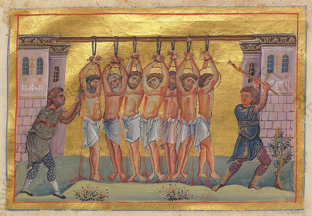 Святой мученик Уар и семь учителей христианских Константинополь. 985 г. Миниатюра Минология Василия II. Ватиканская библиотека. Рим.